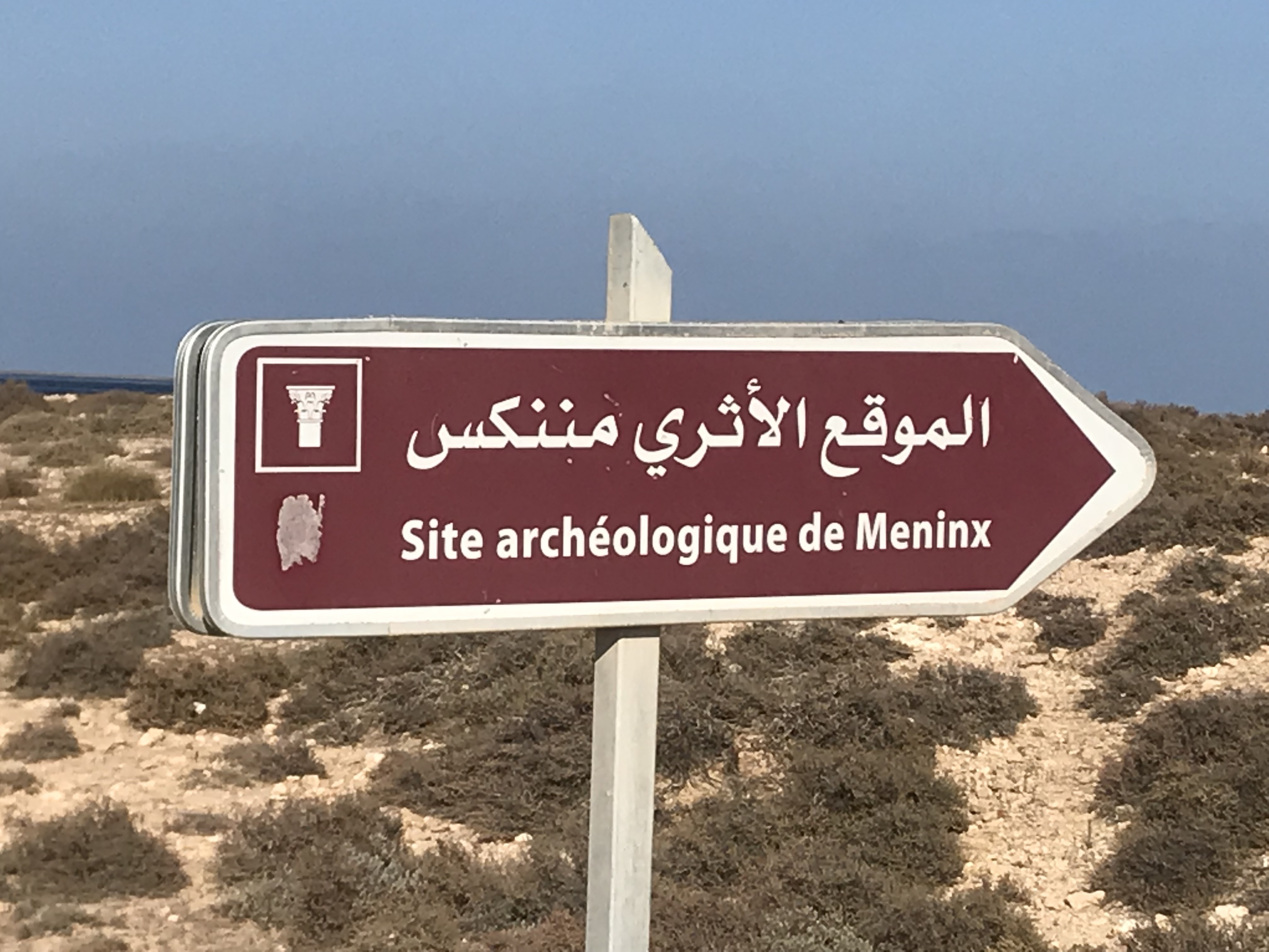 Site archéologique de Méninx, 2018.